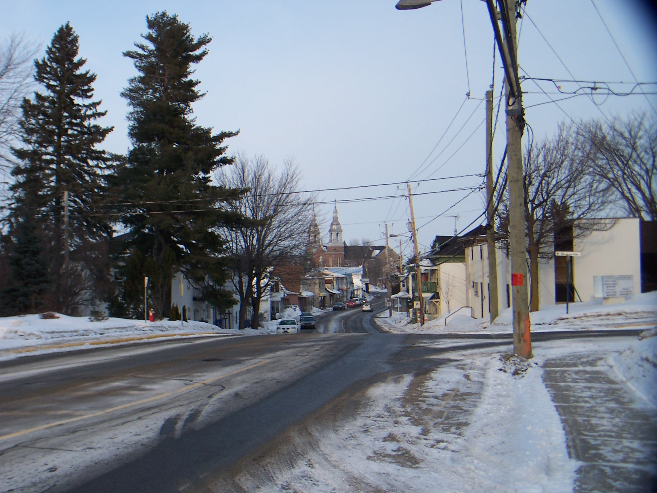 Rue Saint-Pierre (R-325)